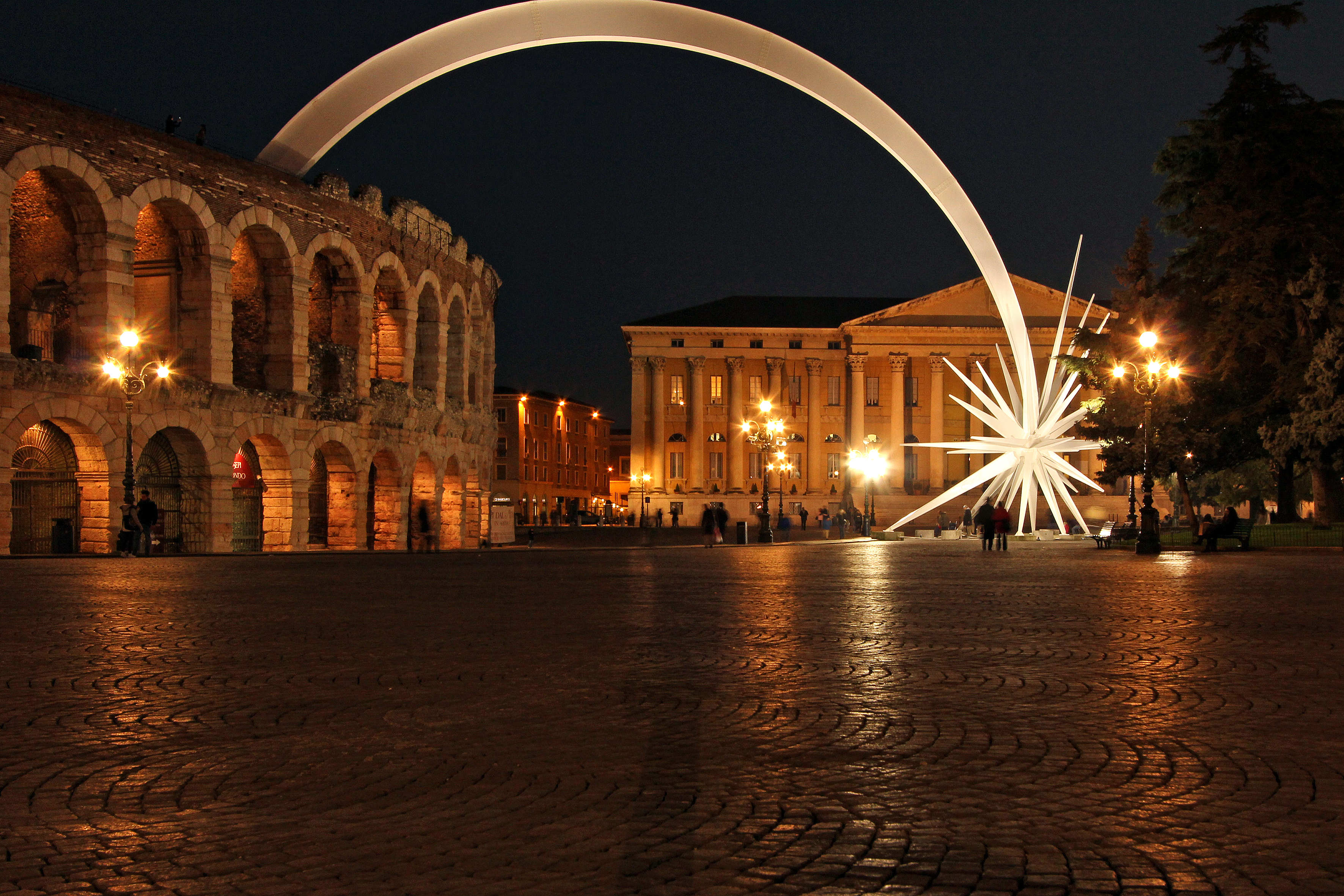 Arena di Verona - L'arena e la stella sono a nord di piazza Bra e in fondo si vede palazzo Barbieri This is a photo of a monument which is part of cultural heritage of Italy.